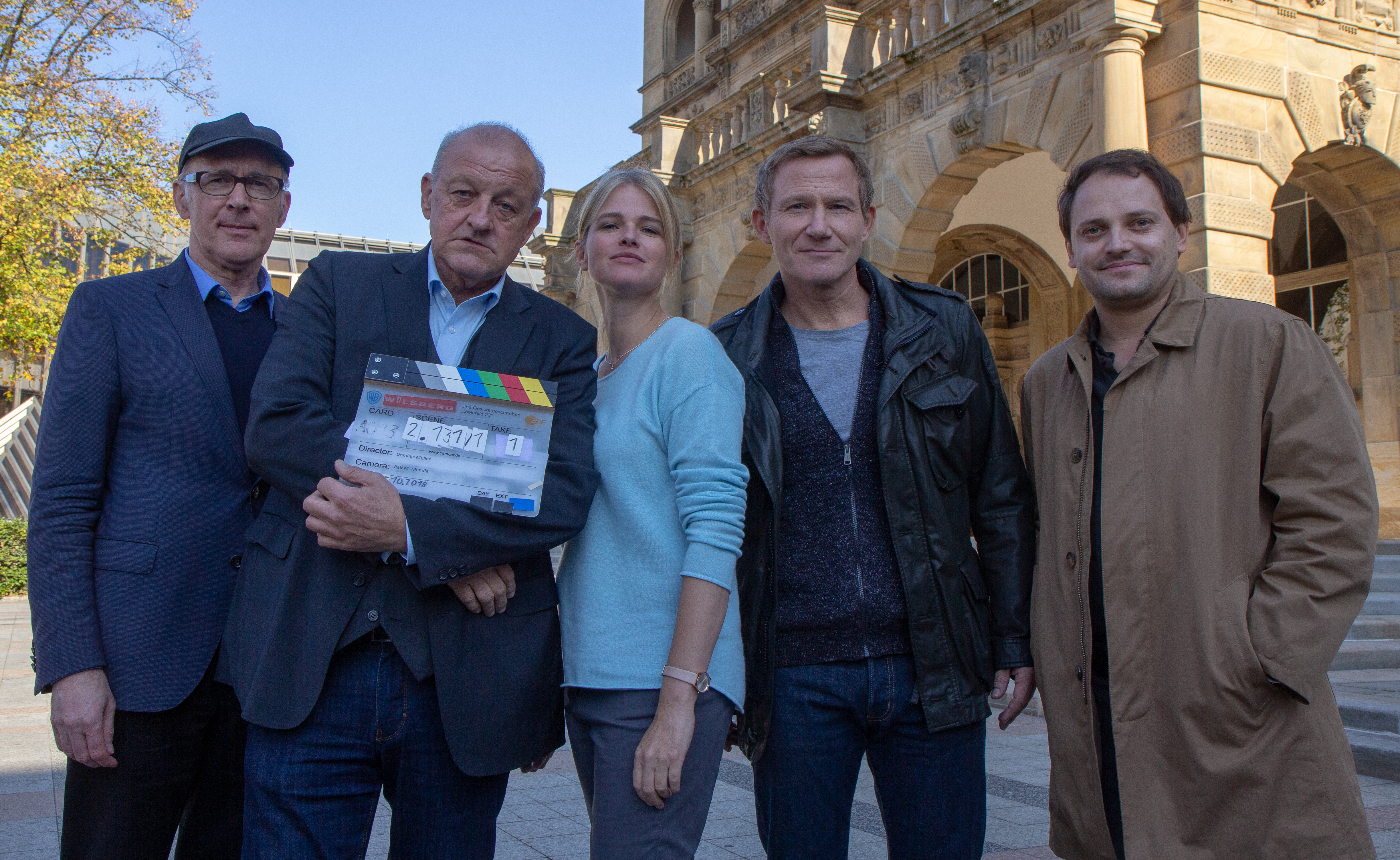 Pressetermin am Set "Wilsberg" am Alten Rathaus in Bielefeld am 15. Oktober 2018. Gruppe: Anton Moho, Leonhard Landsink, Mira Bartuscheck, Roland Jankowsky, Stefan Haschke